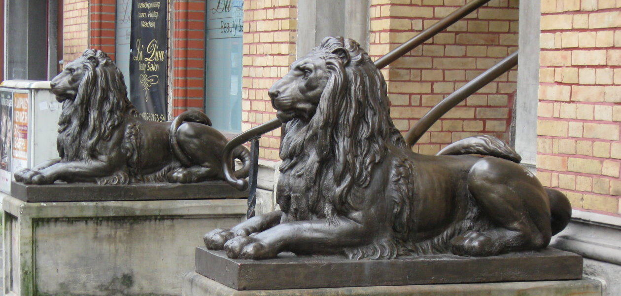 Zwei Löwen, gusseiserne Plastiken in Hamburg-Harburg, Schloßmühlendamm 25, von Ernst von Bandel This is a photograph of an architectural monument.